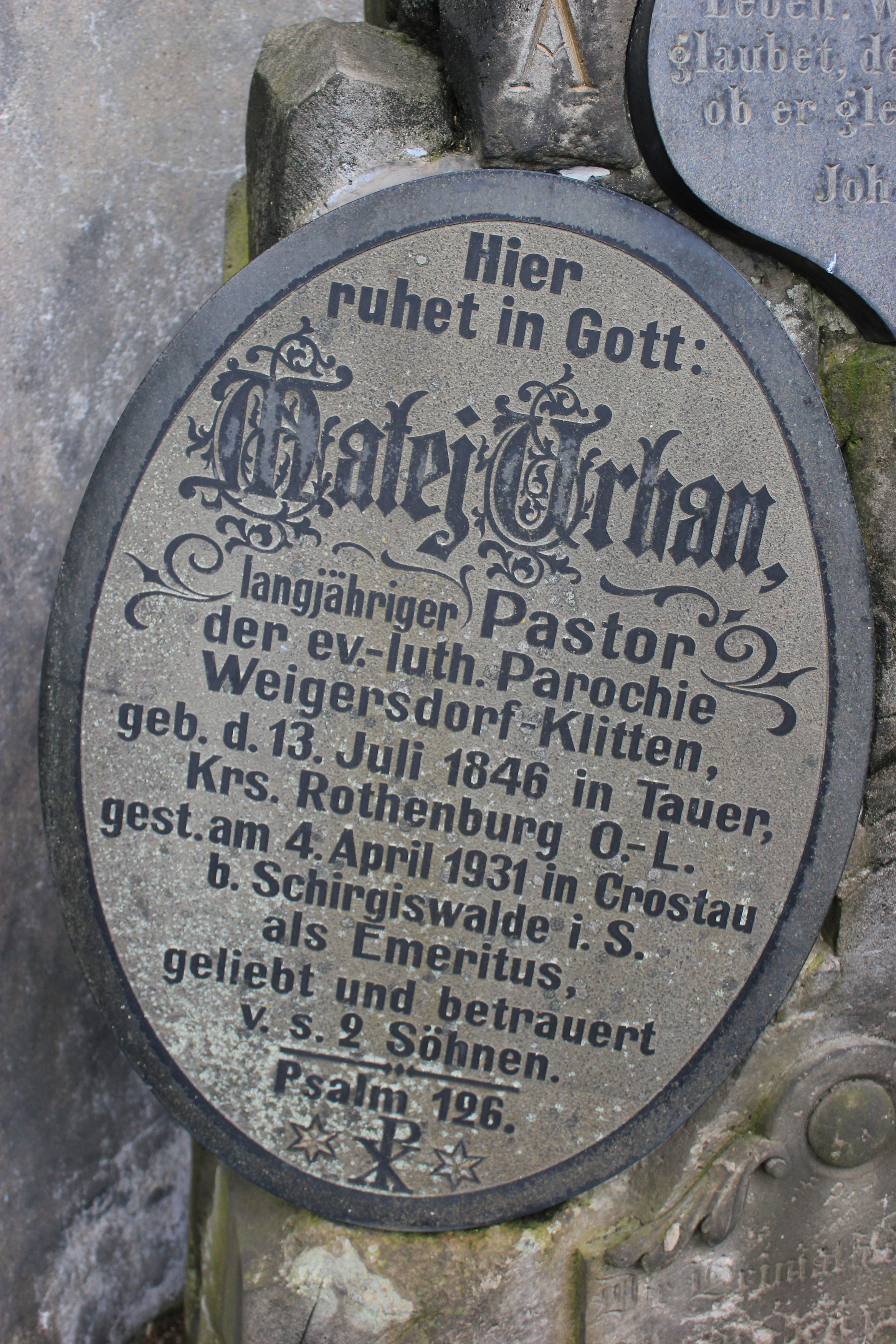 Hornjoserbsce: Narowny kamjeń Mateja Urbana na Wukrančanskim starolutherskim kěrchowje.